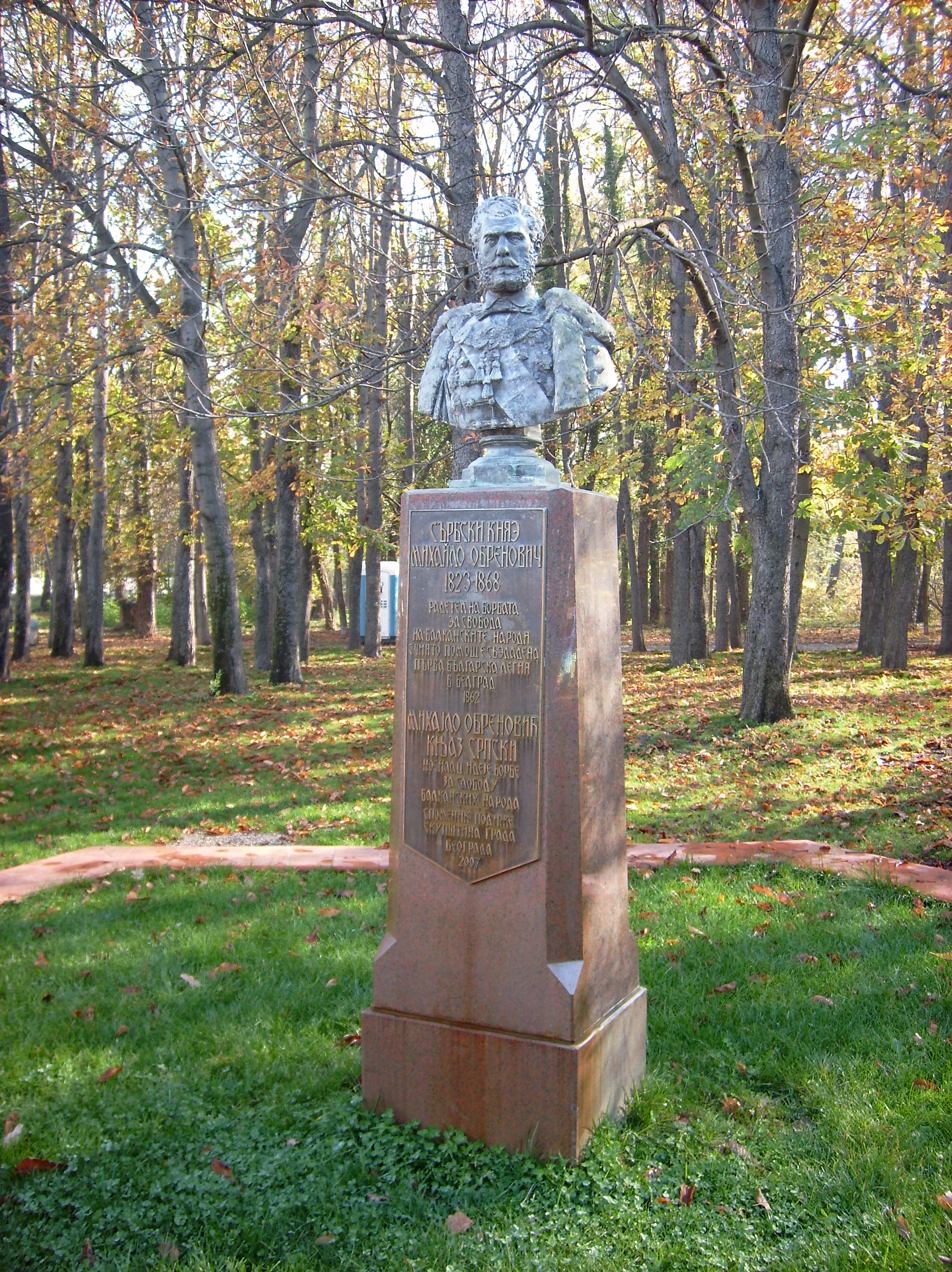 Паметник на сръбския княз Михайло Обренович в Южния парк в София